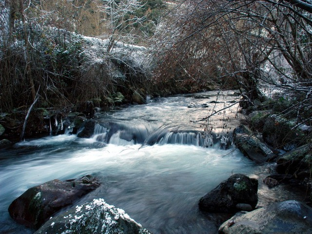 El Rio Deva a su paso por Camaleño © jlgomezlinares